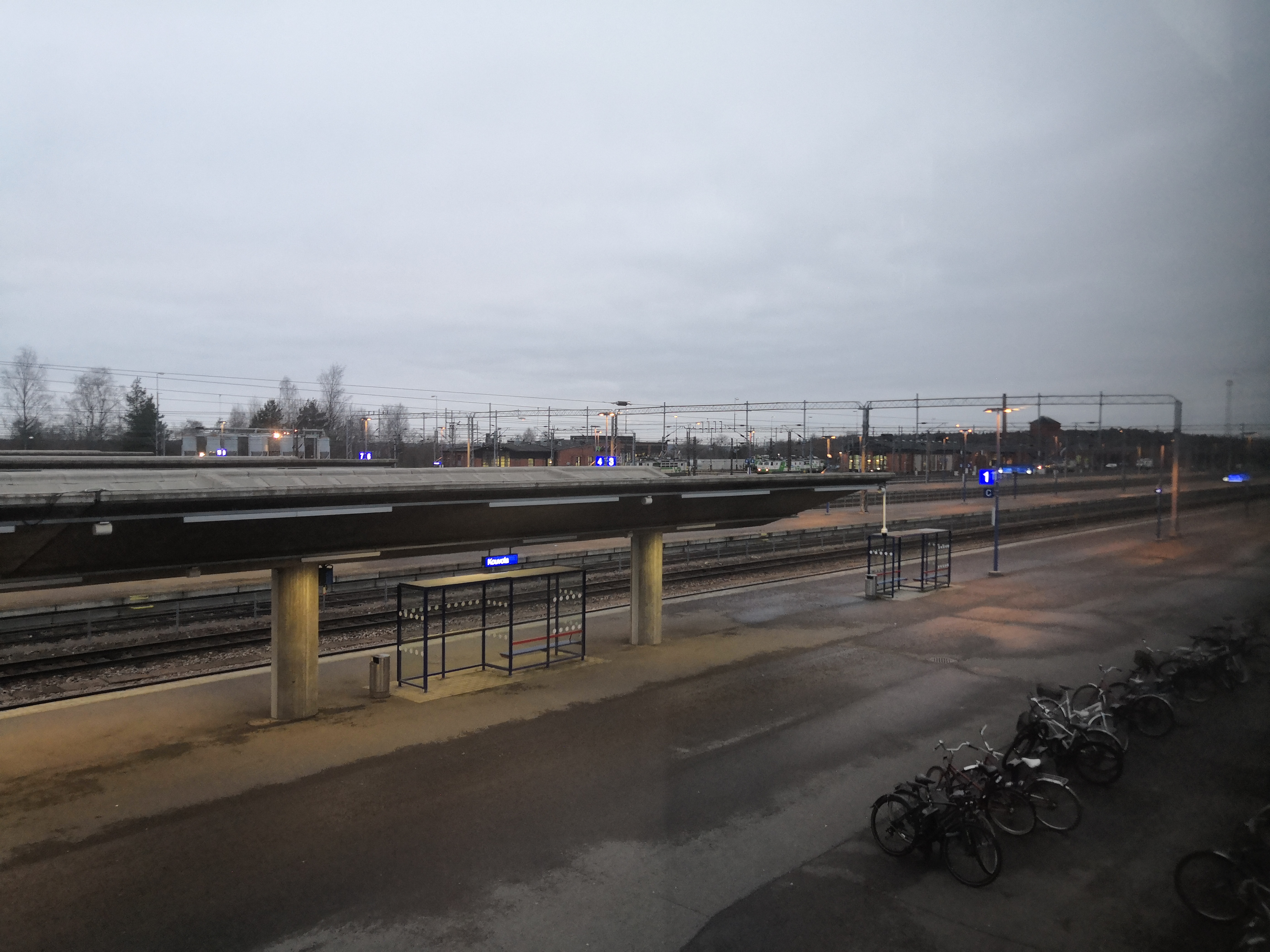 Kouvolan rautatieaseman ratapiha marraskuussa 2019